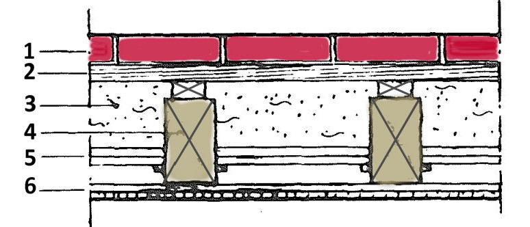 Sektion genom ett vindsbjälklag med brandbotten. 1 brandbotten av tegel 2 golvbeläggning 3 tung fyllning (t.ex. sand) 4 bärande bjälkar 5 blindbotten 6 panel och puts